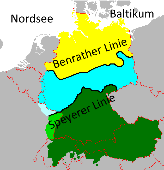 Rozčlenění nářečí německého jazyka